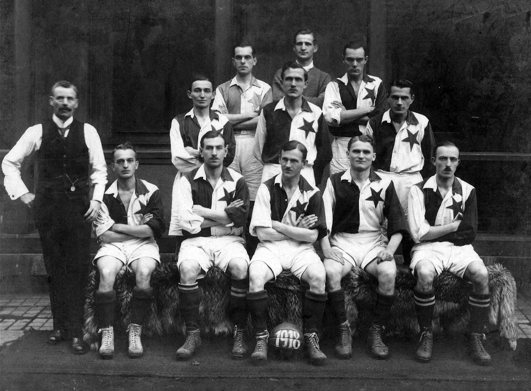 Fotbalisté Slavie v roce 1918, vlevo stojí legendární trenér Johnny Madden.